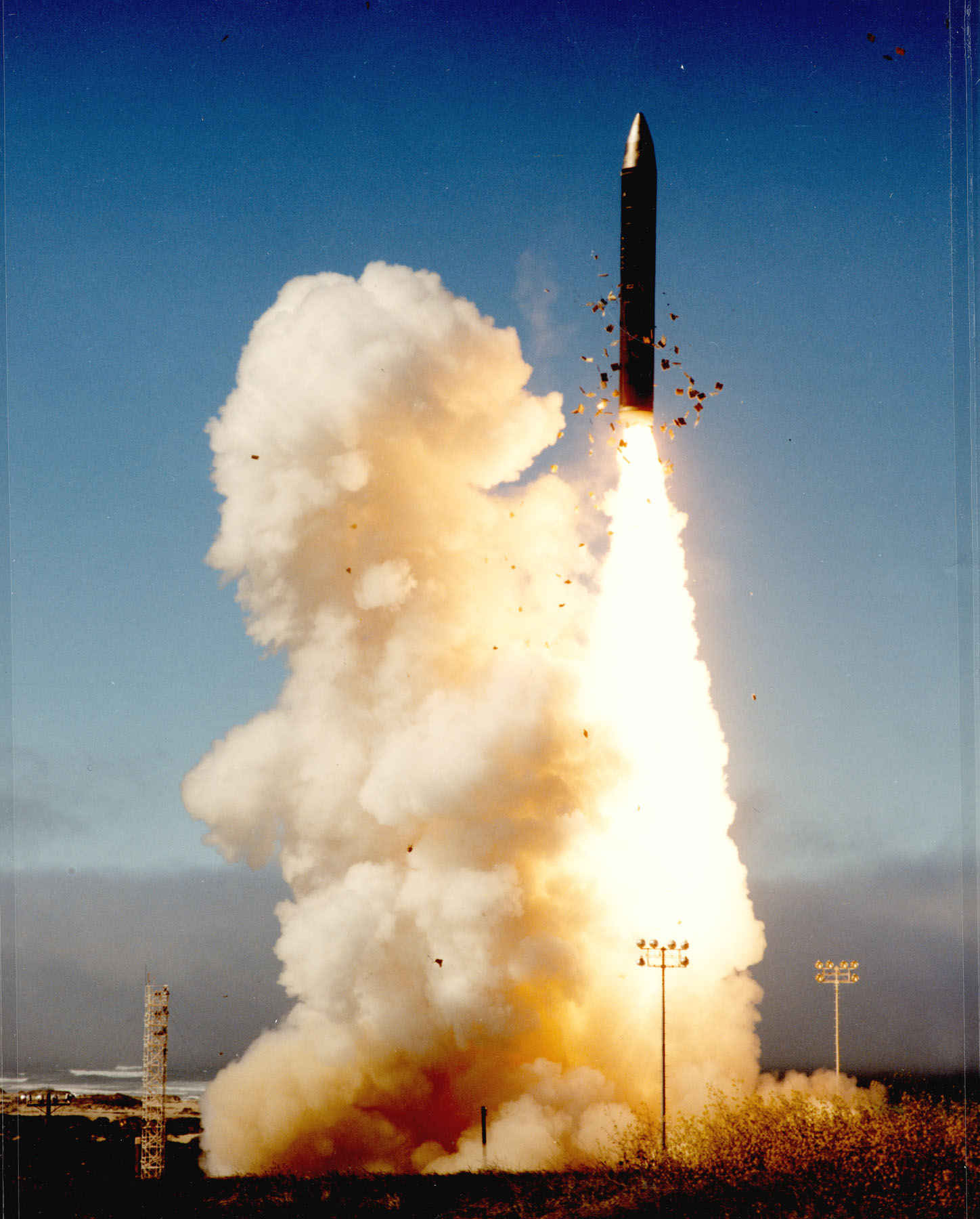 Peacekeeper missile after silo launch, Vandenberg AFB, CA.